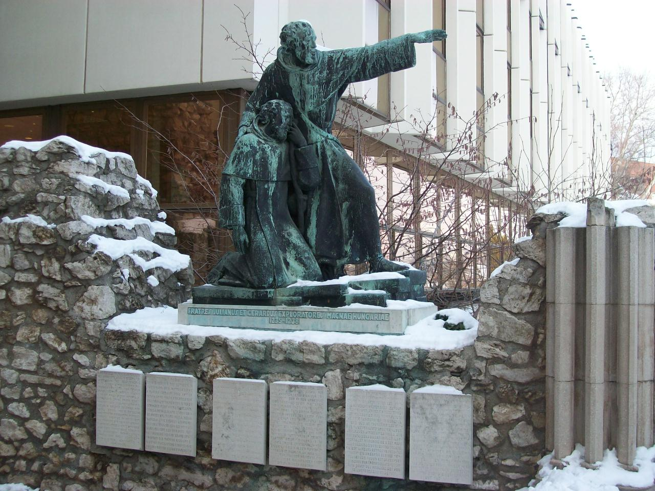 Antal Károly: Gellért és Julianus barát szobra a budai várban. Az emlékművet Bendefy László kezdeményezésére állították 1937-ben, mai helyére 1976-ban helyezték át